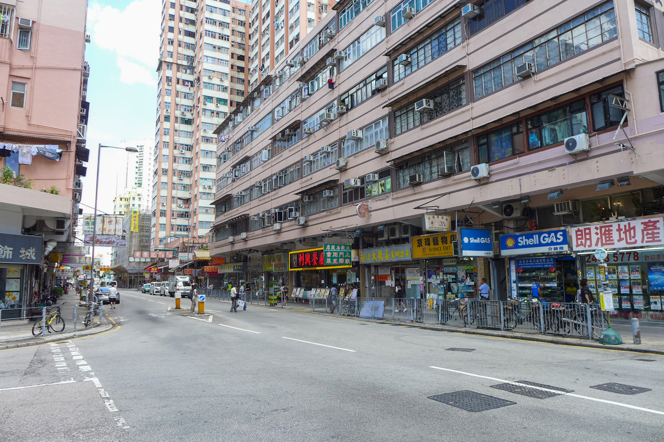 Kau Yuk Road